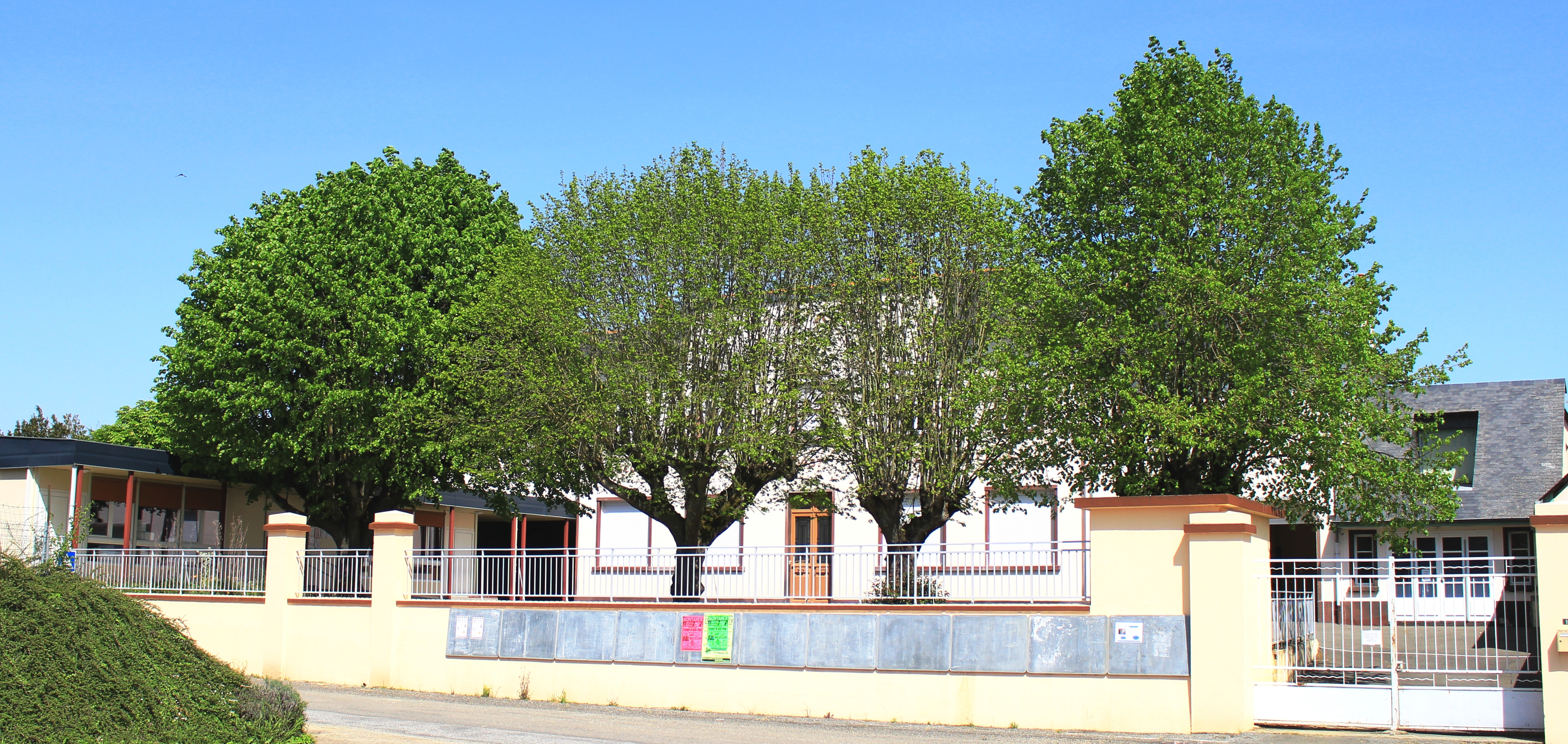 École de Séron (Hautes-Pyrénées)